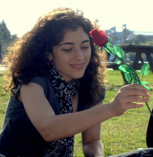 רוני דלומי